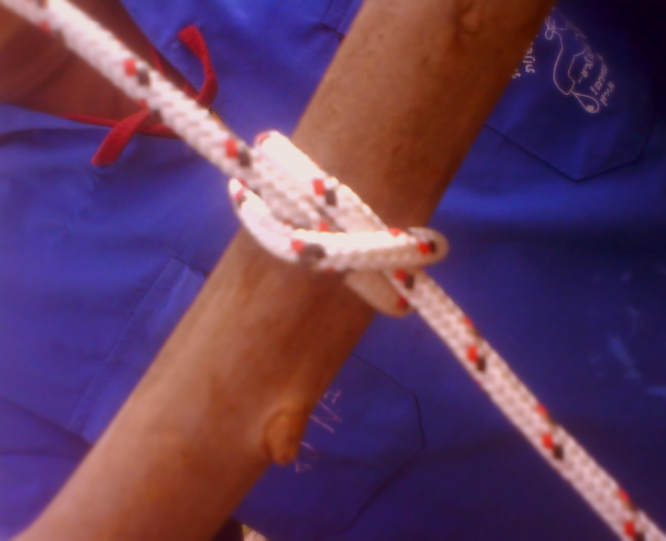 קשר מוט